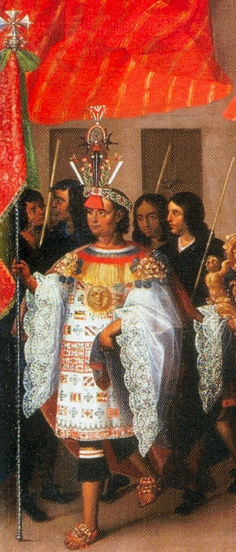 Detalle del "Desfile de la Parroquia de San Sebastián" (Serie del Corpus Christi, Cuzco)